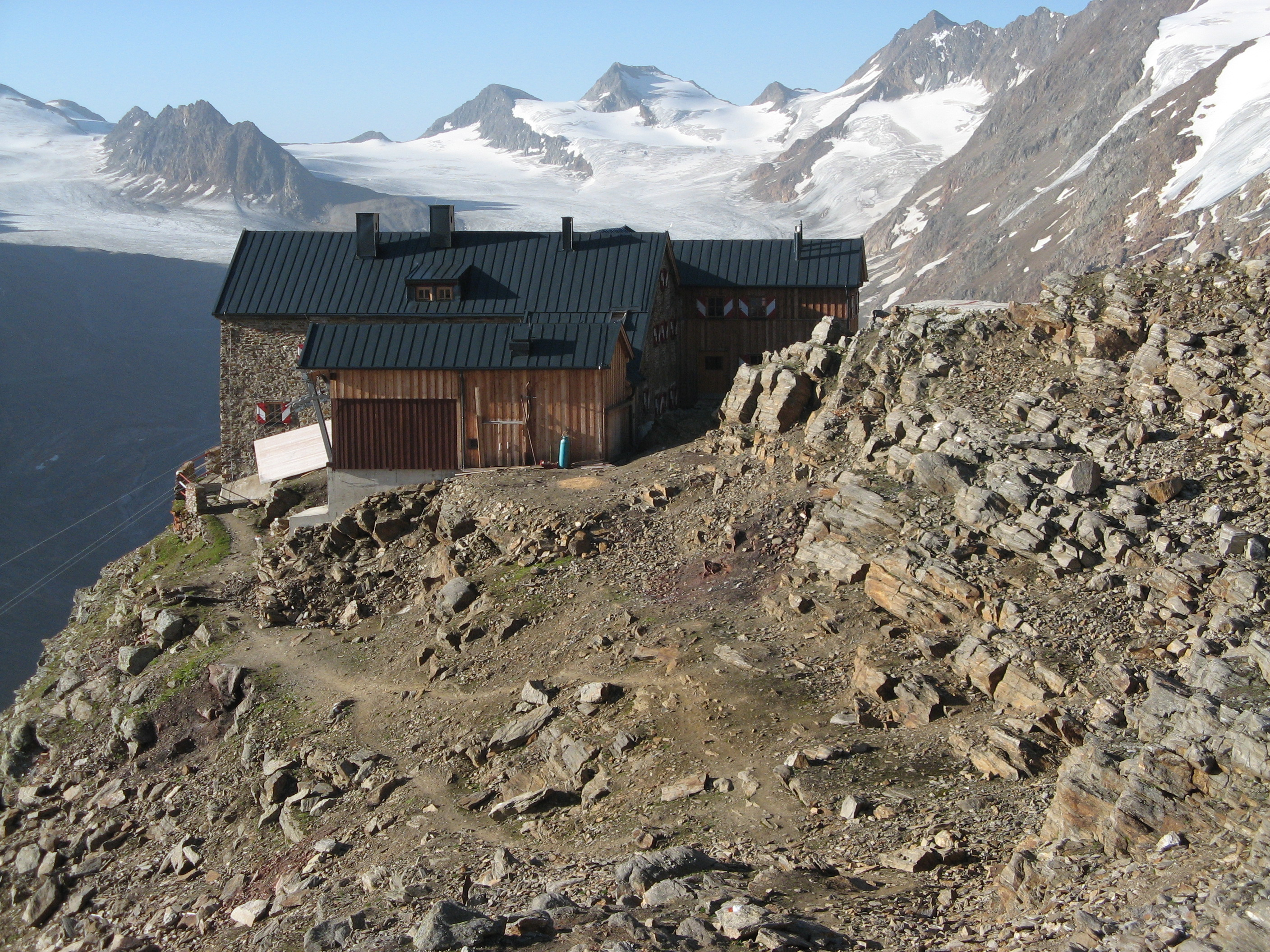 Ramolhaus in den Ötztaler Alpen. Im Hintergrund der Gurgler Ferner, dahinter (v.l.n.r) der zum Annakogel (3333m) ziehende, markante Mitterkamm, dahinter Gurgler Eisjoch (3151m), Bankspitze (3311m), Falschunggspitze (3361m), und der ganz rechte sichtbare Gipfel ist die Karlesspitze (3465m).